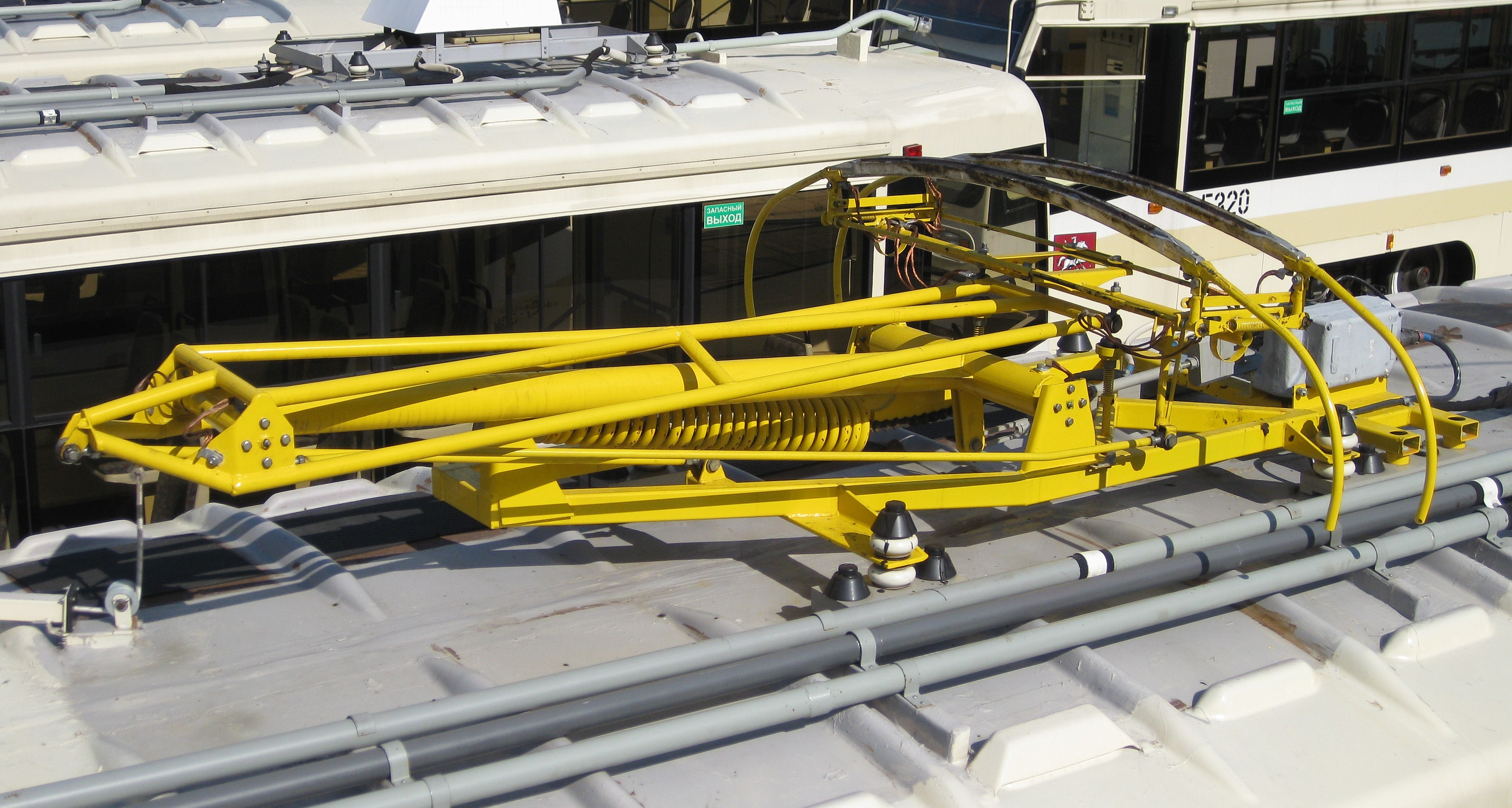 Полупантограф на крыше трамвая 71-619А.